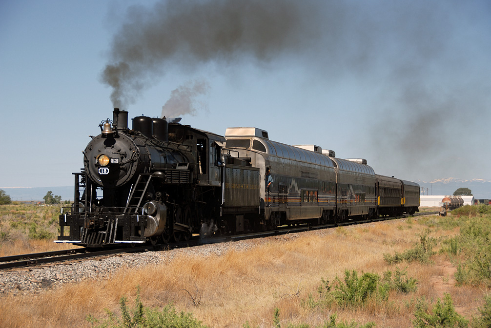 DSC_0073 071xrp blanca jun15 08